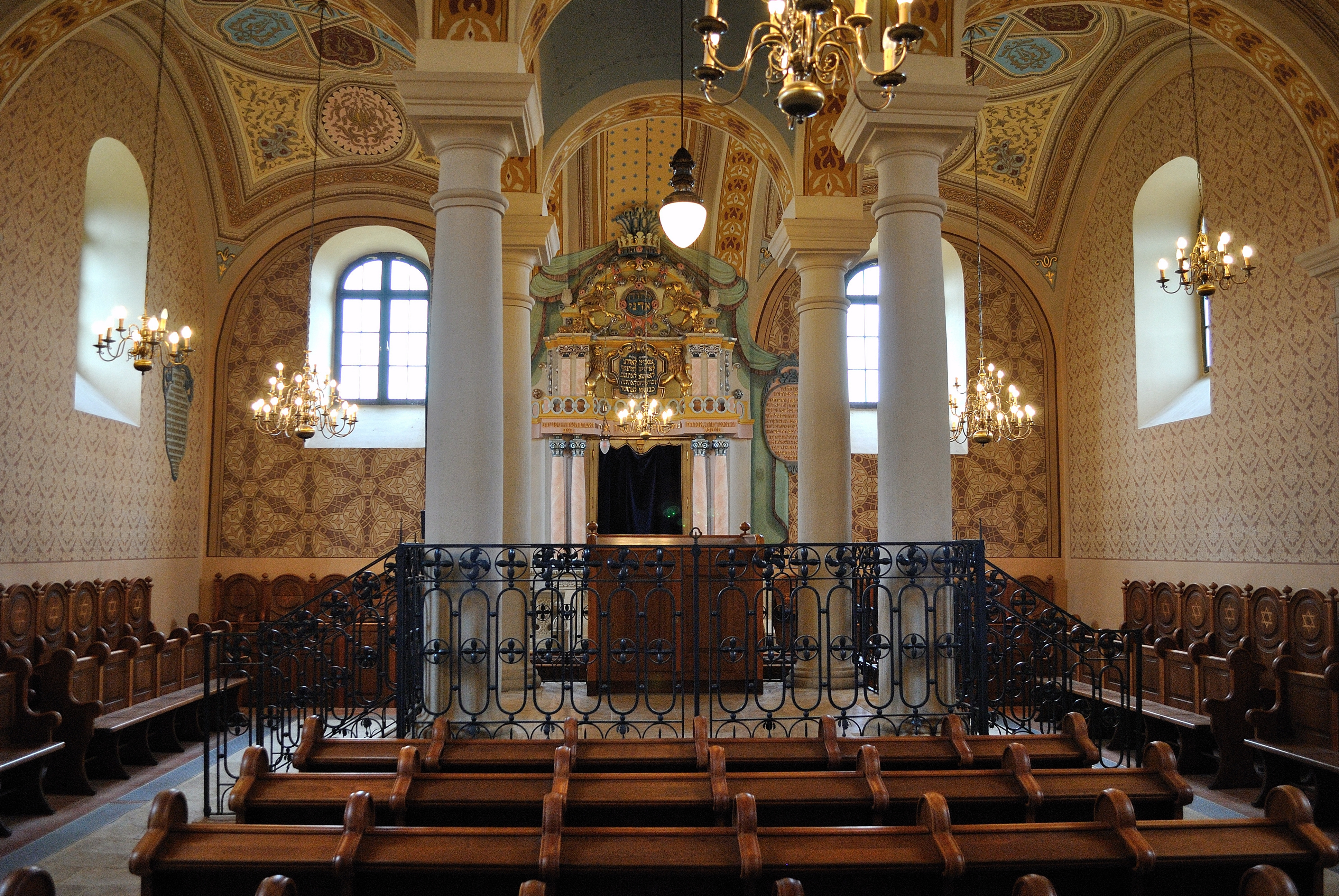 Zsinagóga, Mád This is a photo of a monument in Hungary. Identifier: 2883